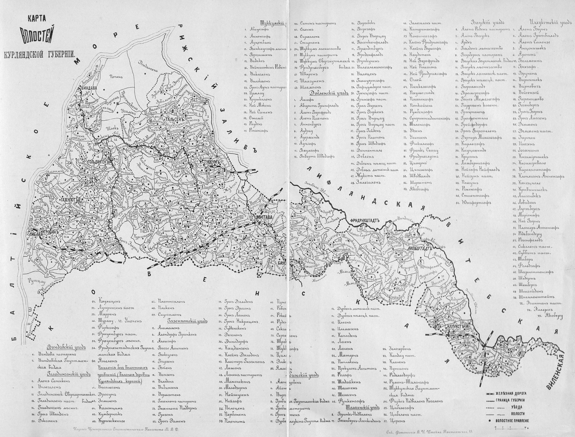 Kurzemes guberņas pagastu karte